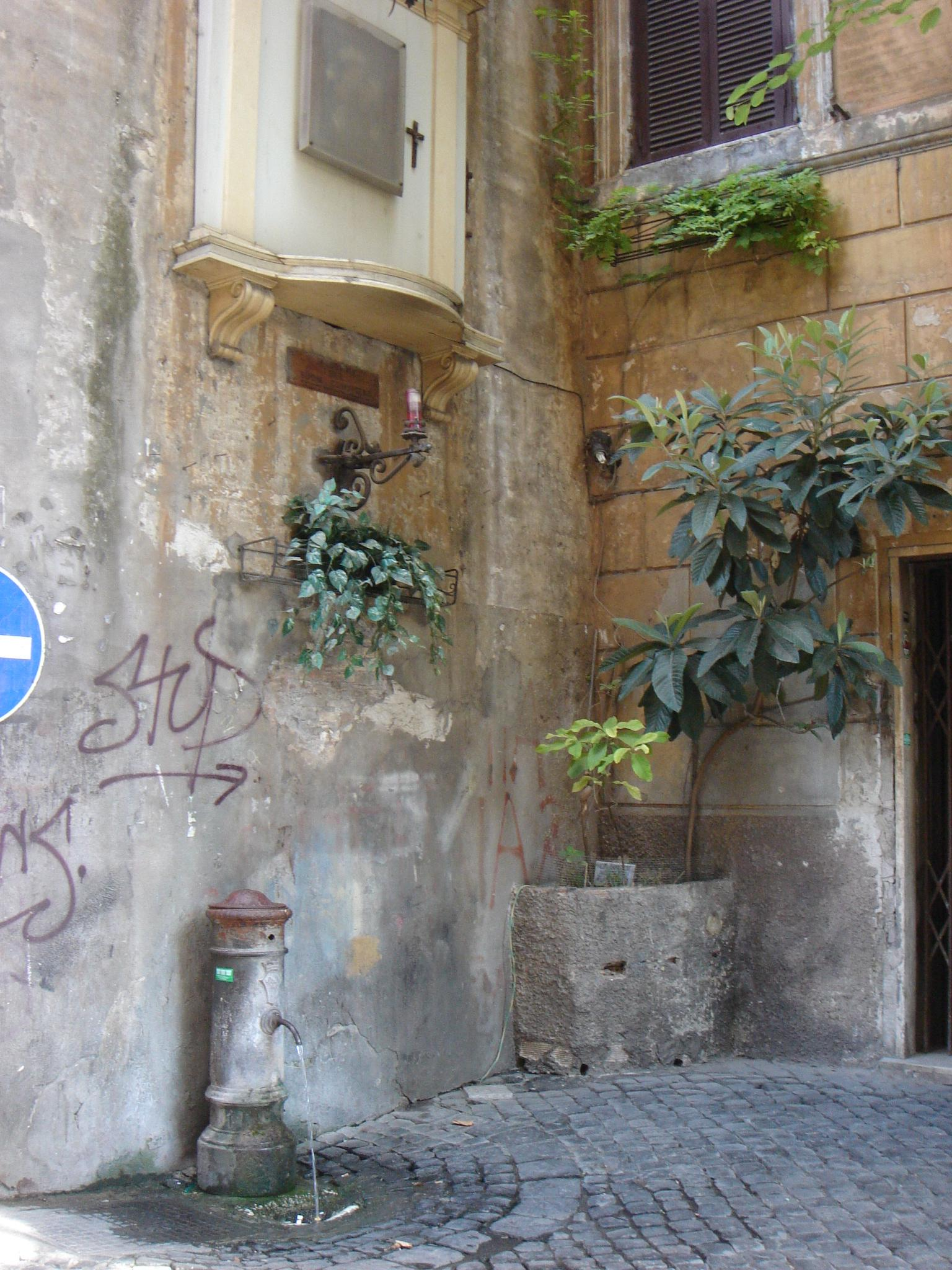 Roma, vicolo delle Vacche (Ponte): Madonna e fontanella